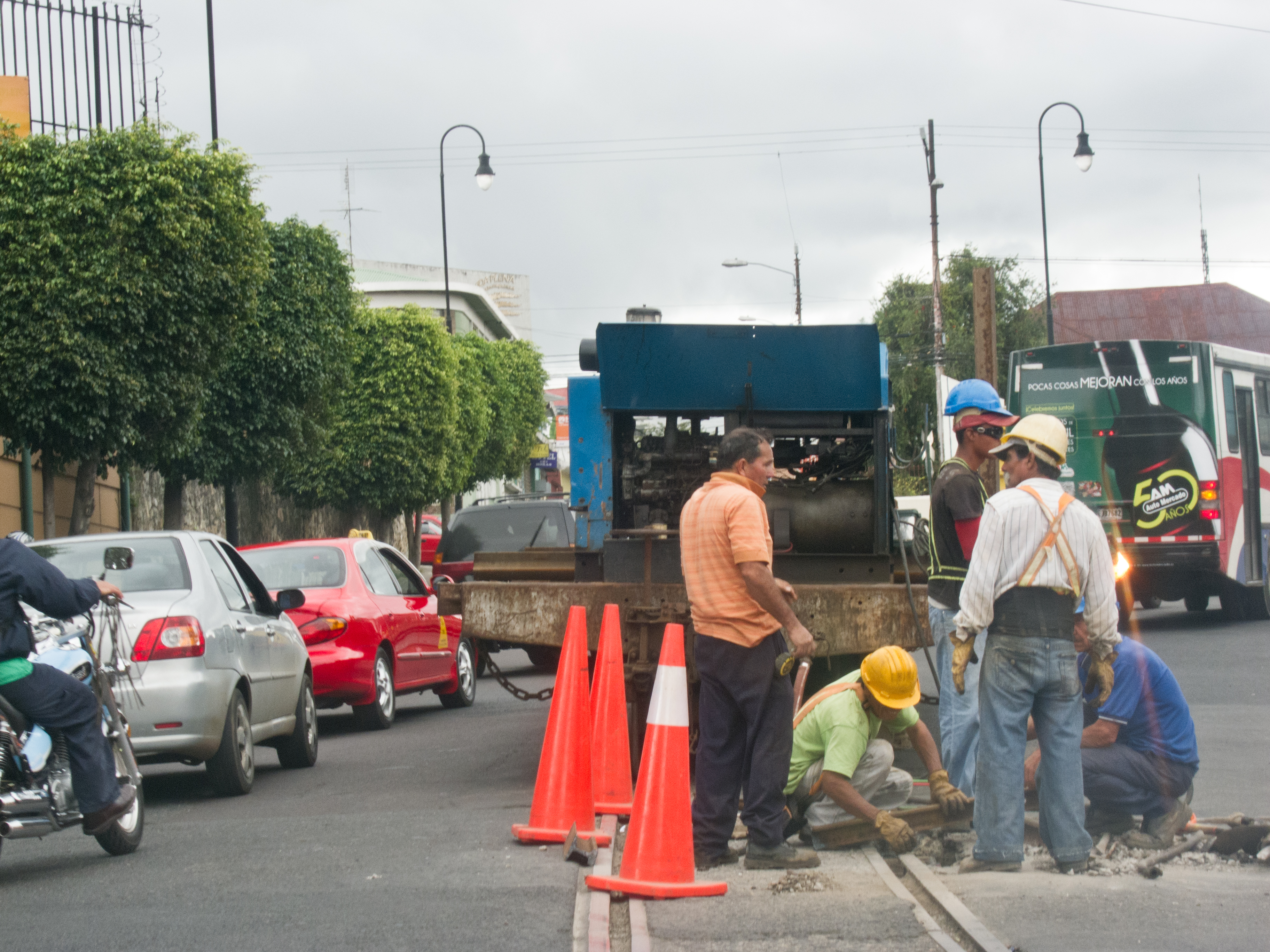 Unos trabajadores de INCOFER arreglando la via ferrera en San José, Costa Rica